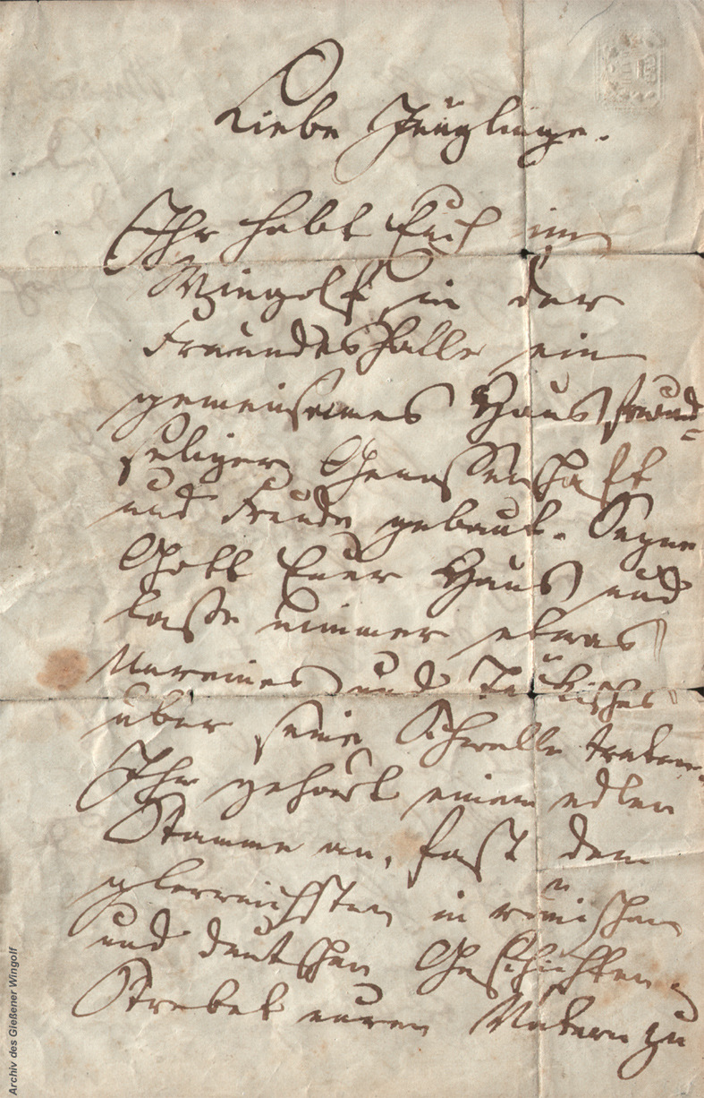 Brief (Seite 1) von Ernst Moritz Arndt vom 2. Januar 1860 an den Gießener Wingolf